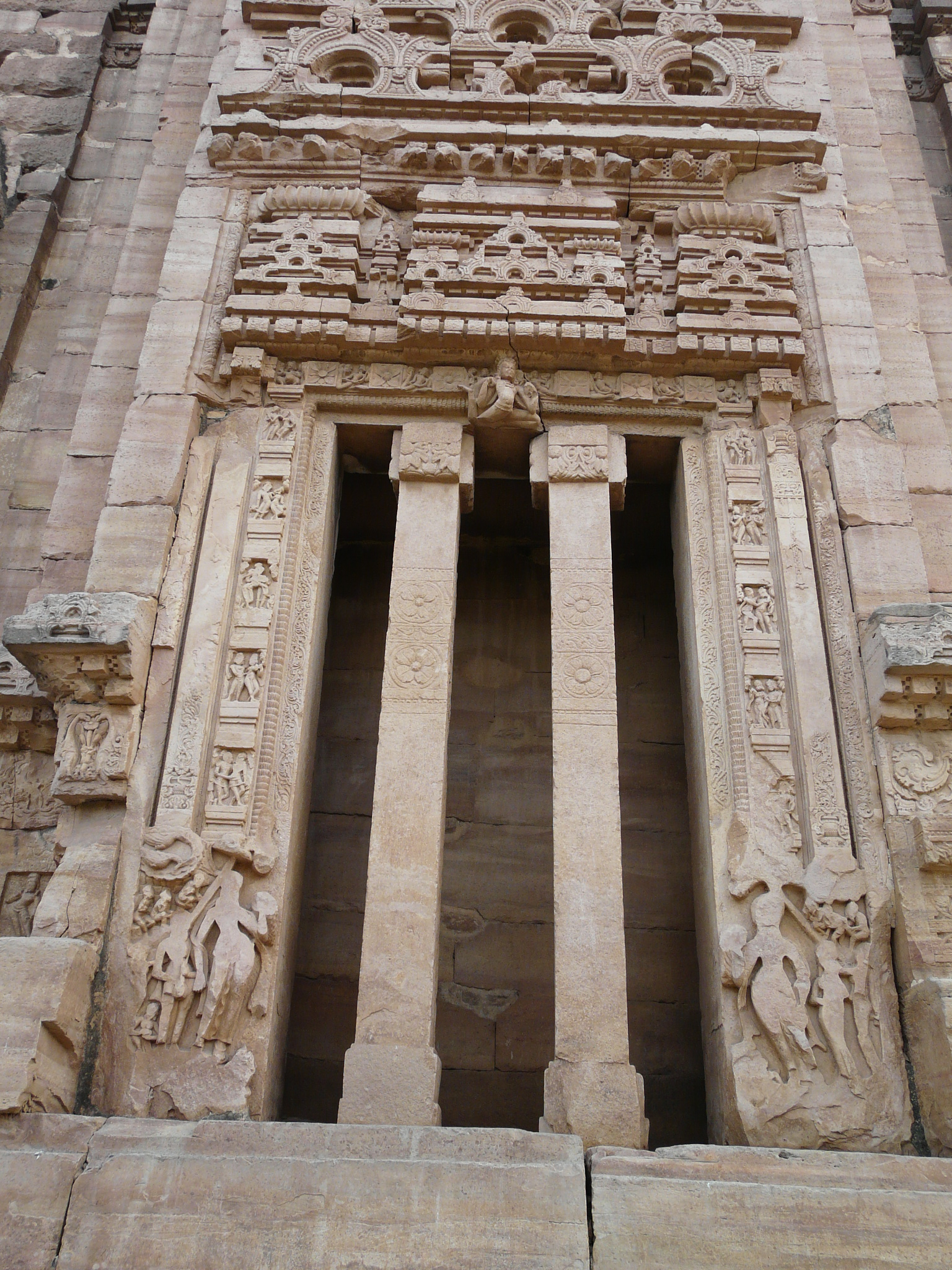 Teli ka Mandir Teli ka Mandir, Gwalior, Madhya Pradesh, India